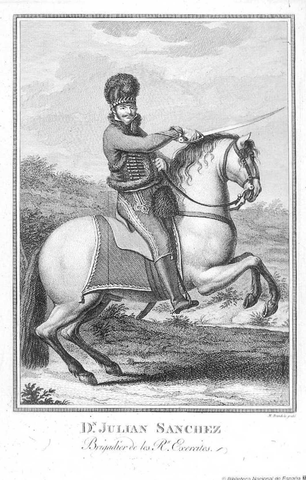 Retrato de Julián Sánchez, el Charro, Grabado de Mariano Brandi. Inscripción: Dn. Julián Sánchez, Brigadier de los Rs. Exércitos. Madrid, Biblioteca Nacional